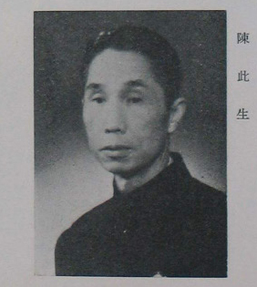 中國人民政治協商會議第一屆全體會議代表